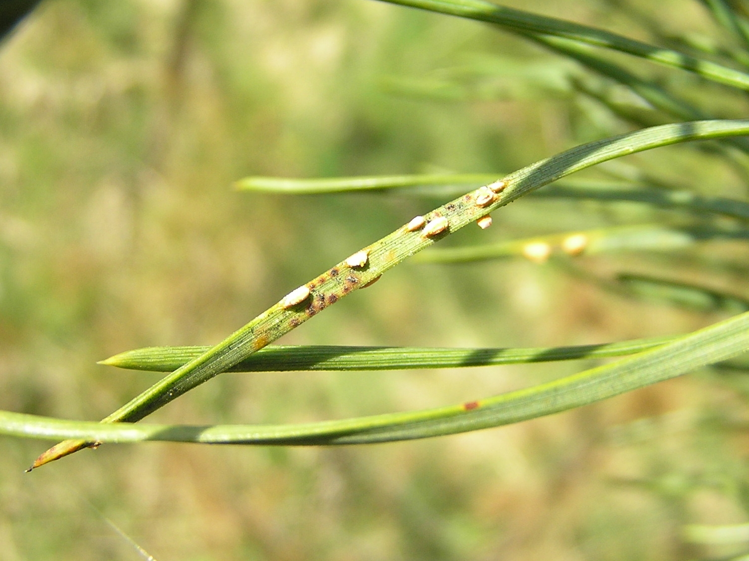 Coleosporium tussilaginis on Pinus sylvestris, Białowieża, Polska